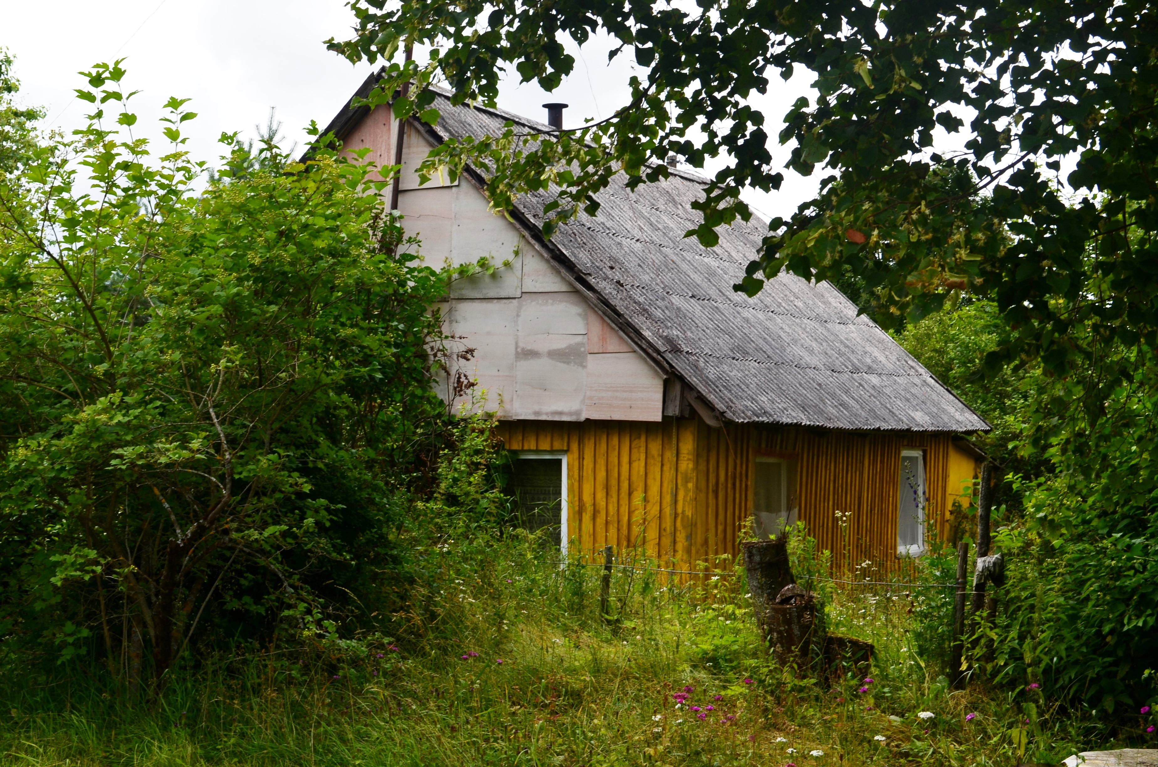 Burbiškiai, Šilalės raj. Žemaitėška: Borbėškē, Šėlalės raj.